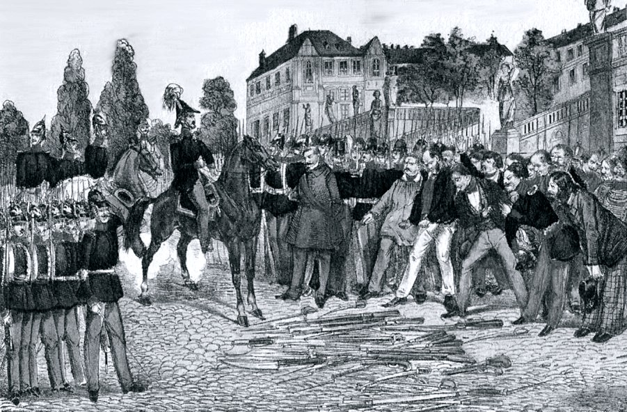 Kapitullimi i forcave revolucionare ne Rastatt para forcave te Lidhjes veriore gjermane, 23 korrik 1849